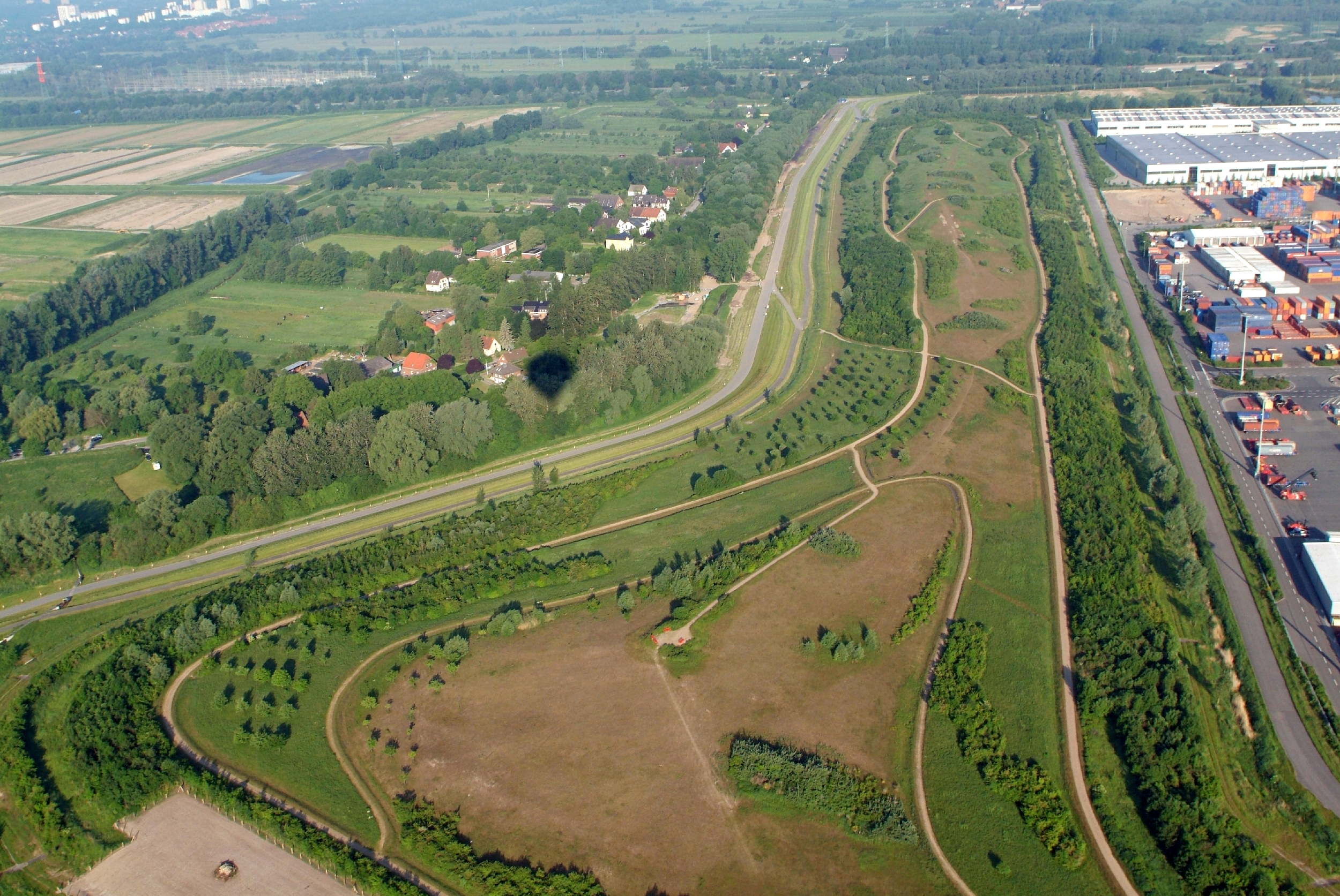 Projekt Heißluftballon. Moorburger Berg, rechts das Container Terminal Altenwerder.